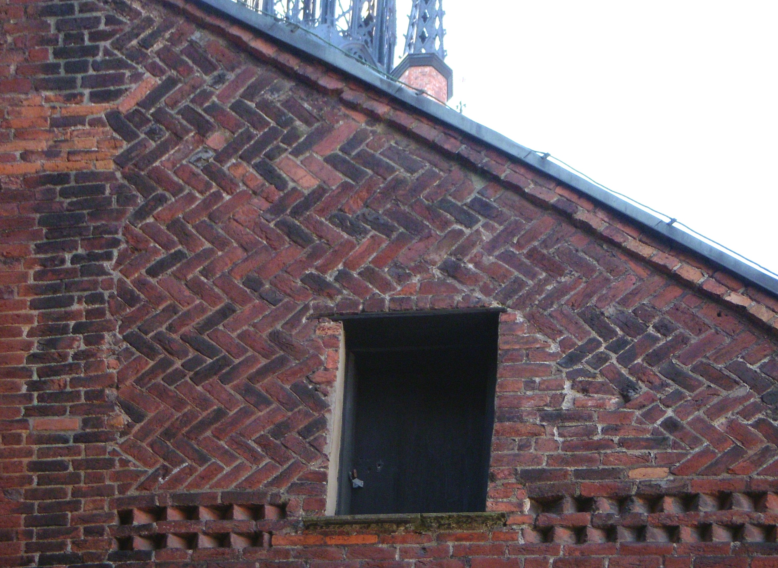 Medeltida murverk på Riddarholmsskyrkan